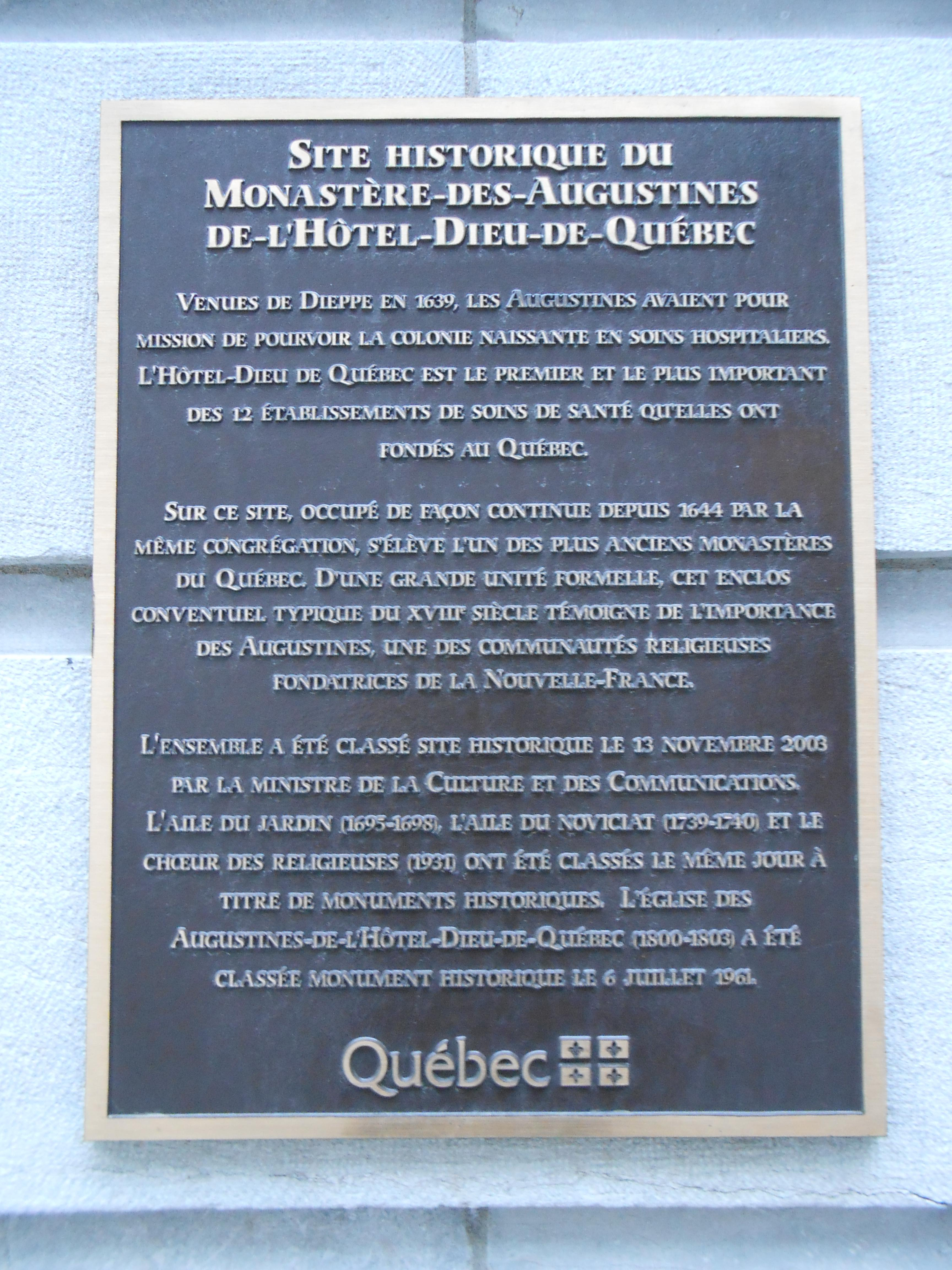 Plaque du site historique du Monastère-des-Augustines-de-l'Hôtel-Dieu-de-Québec Texte de la plaque « Venues de Dieppe en 1639, les Augustines avaient pour mission de pourvoir la colonie naissante en soins hospitaliers. L'Hôtel-Dieu de Québec est le premier et le plus important des 12 établissements de soins de santé qu'elles ont fondés au Québec. Sur ce site, occupé de façon continue depuis 1644 par la même congrégation, s'élève l'un des plus anciens monastères du Québec. D'une grande unité formelle, cet enclos conventuel typique du XVIIIe siècle témoigne de l'importance des Augustines, une des communautés religieuses fondatrices de la Nouvelle-France. L'ensemble a été classé site historique le 13 novembre 2003 par la ministre de la Culture et des Communications. L'aile du jardin (1695-1698), l'aile du noviciat (1739-1740) et le choeur des religieuses (1931) ont été classés le même jour à titre de monuments historiques. »